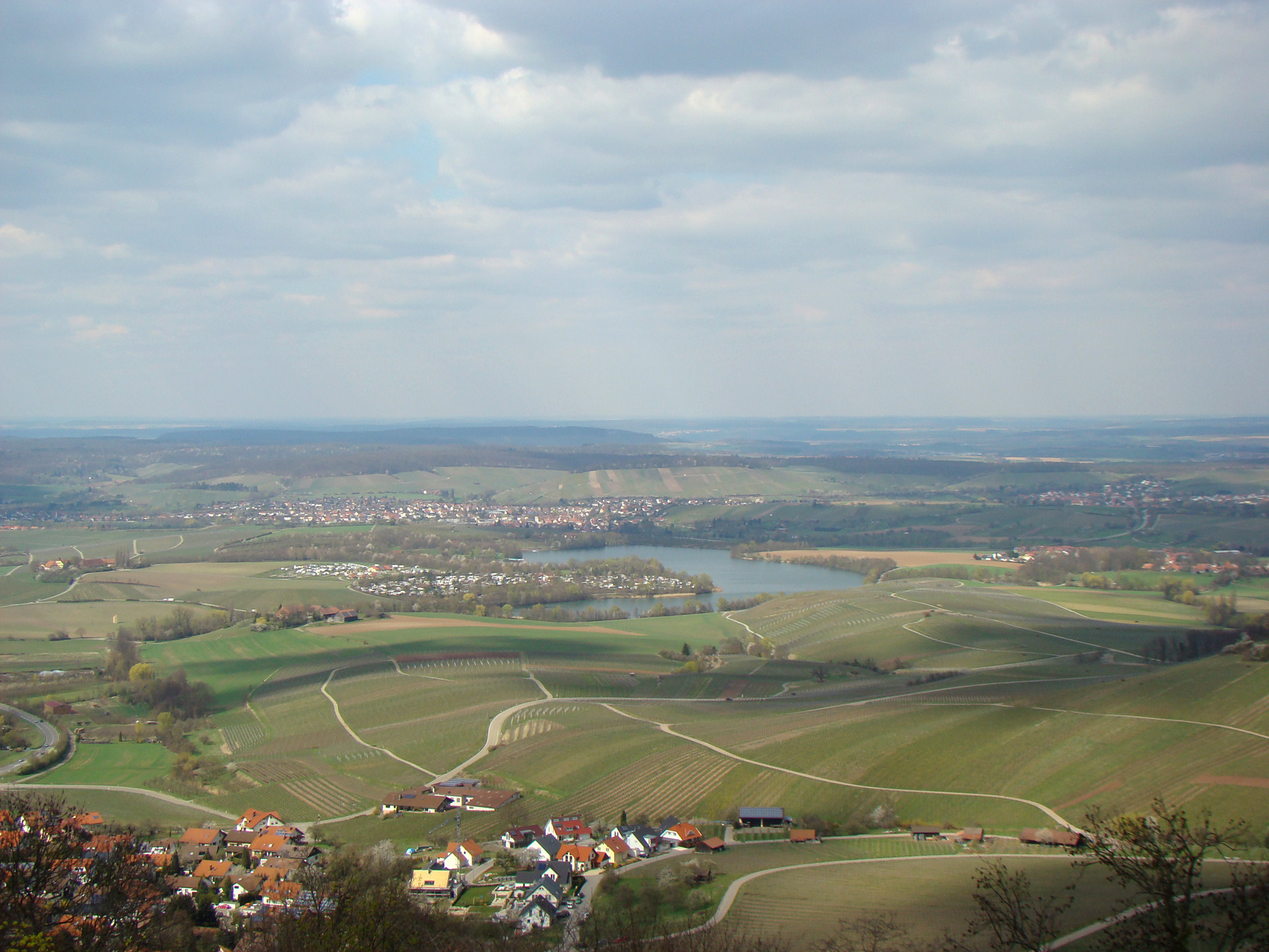 Blick von Löwenstein in Sulmtal und auf den Breitenauer See